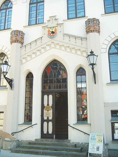 Eingangsportal des Warener Rathauses , oben das Wappen (Waren /Müritz)